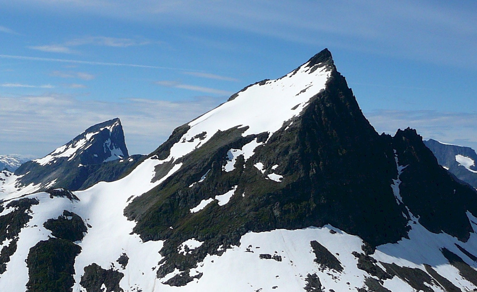 Mt. Slogen and Mt.Jakta, Sunnmøre, Norway